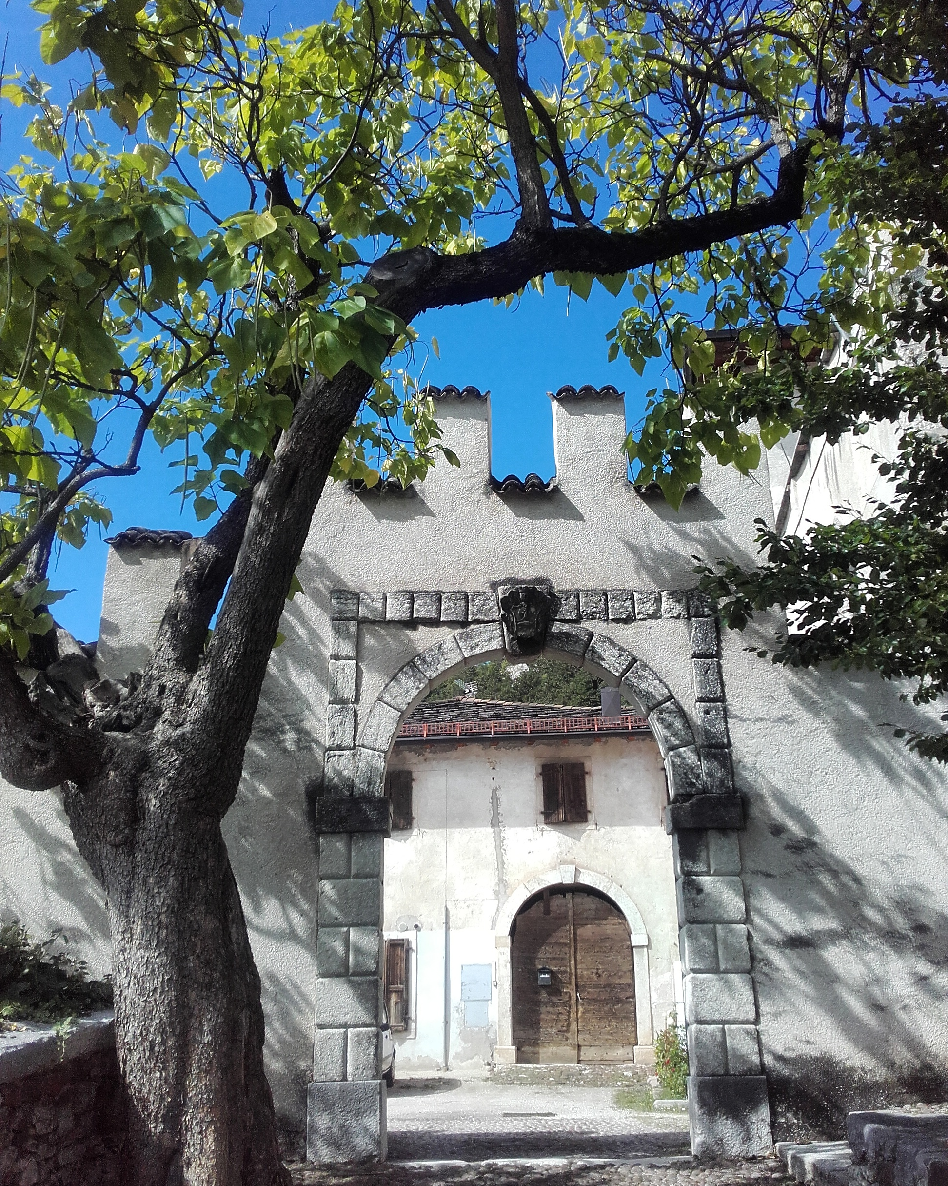 Castel Telvana This is a photo of a monument which is part of cultural heritage of Italy.